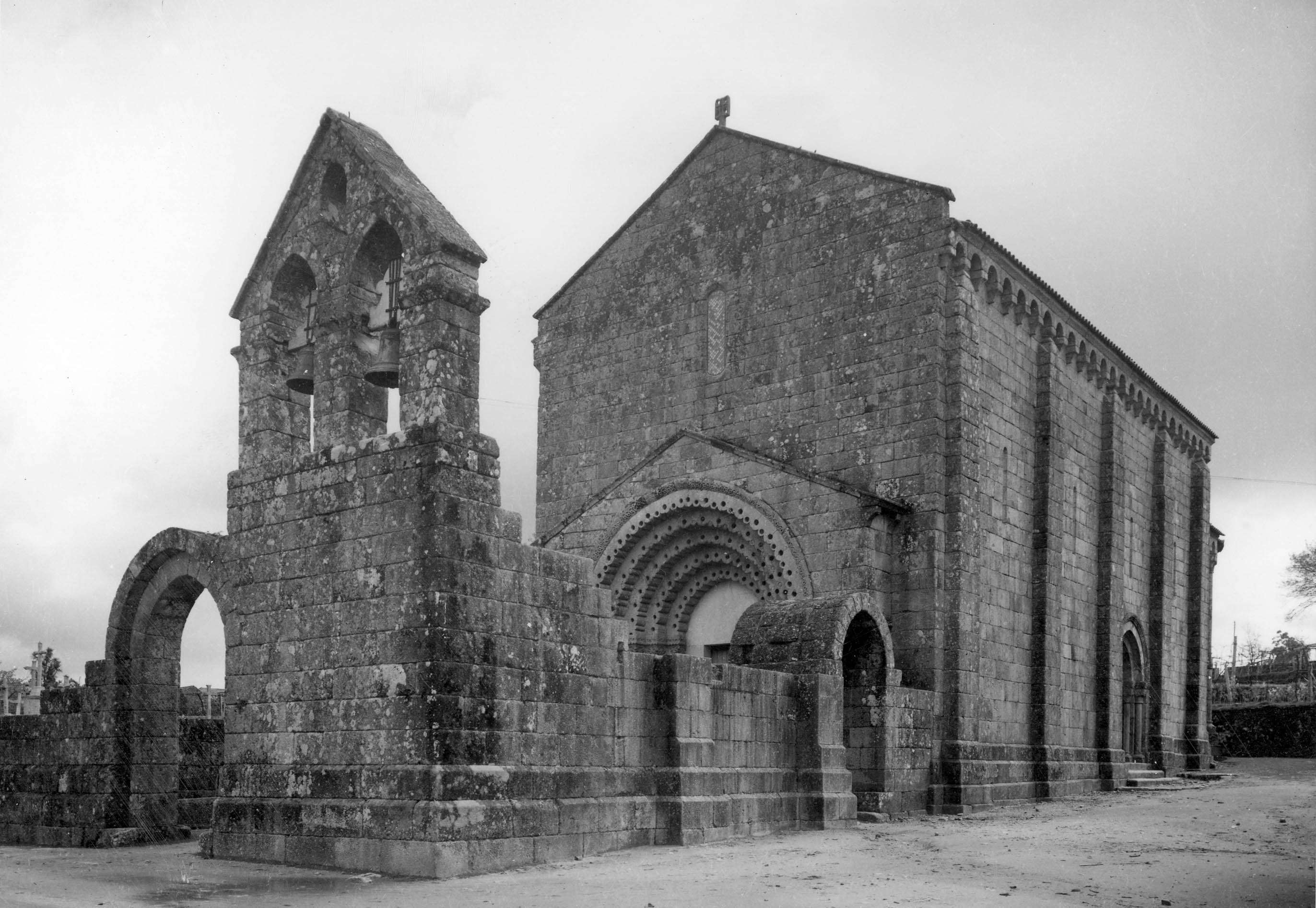 Vista geral. Fotógrafo: Mário Novais, 1899-1967. Orientador científico: Mário Tavares Chicó, 1905-1966. Data aproximada da produção da fotografia original: 1954. [CFT015.274.ic]